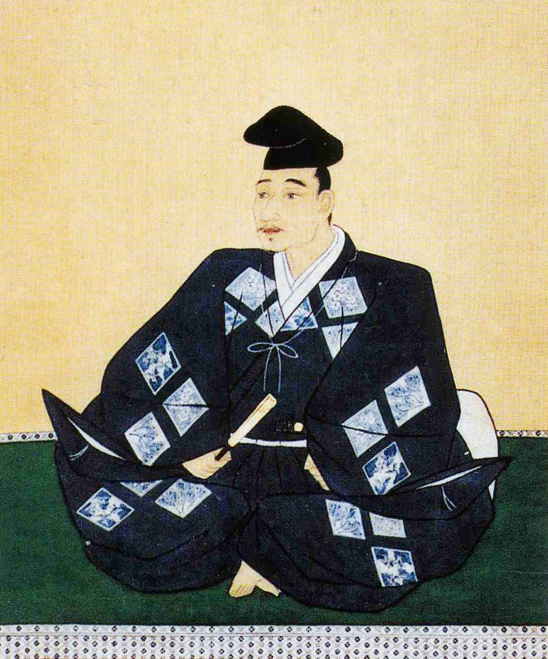 蜂屋頼隆像（部分）